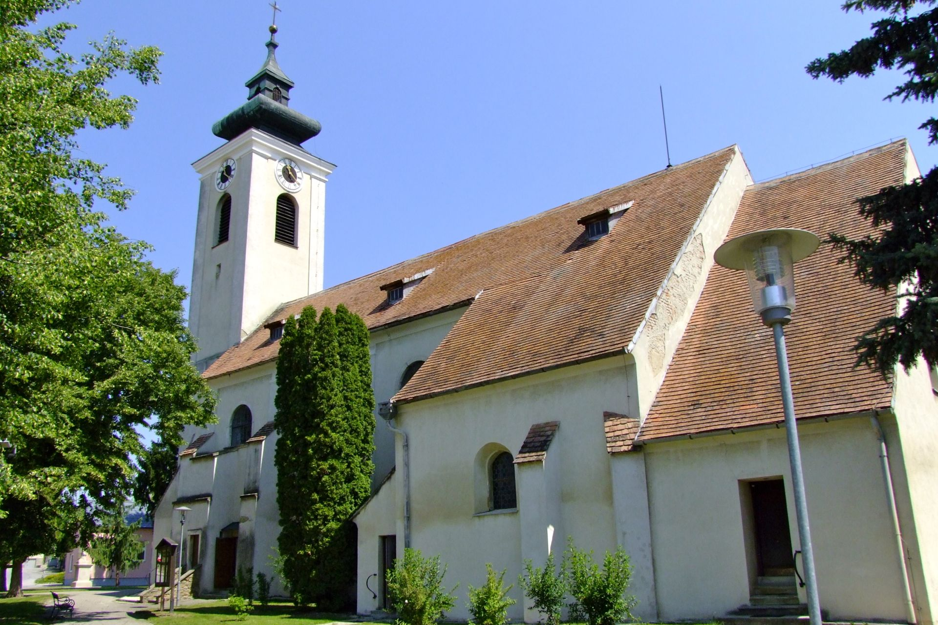 Kath. Pfarrkirche, hl. Nikolaus